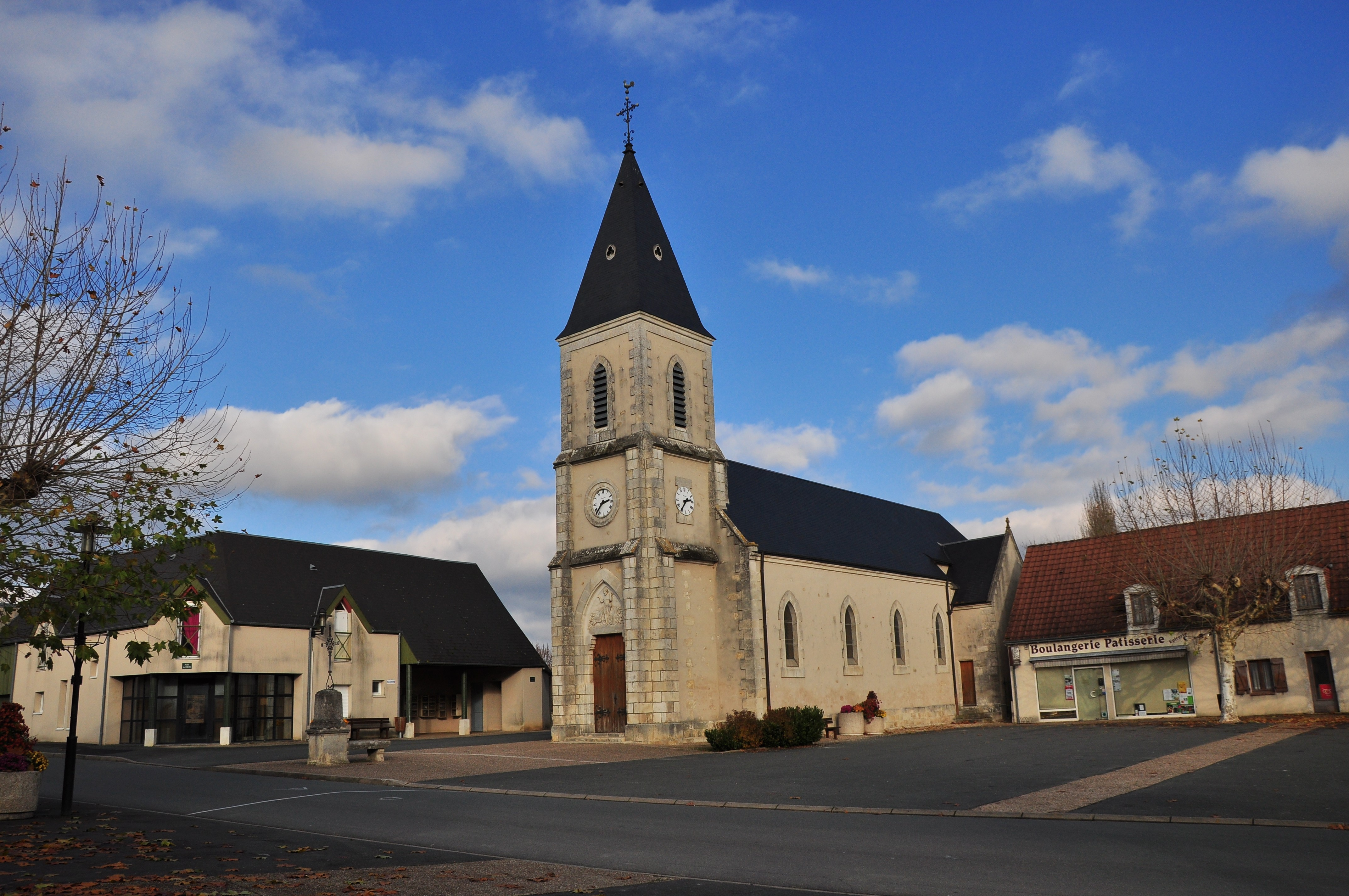 Luant (Indre) - Place de l'église